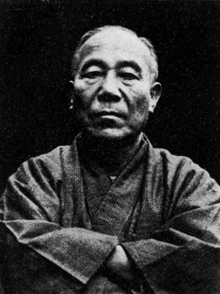 留岡幸助（1864-1934）